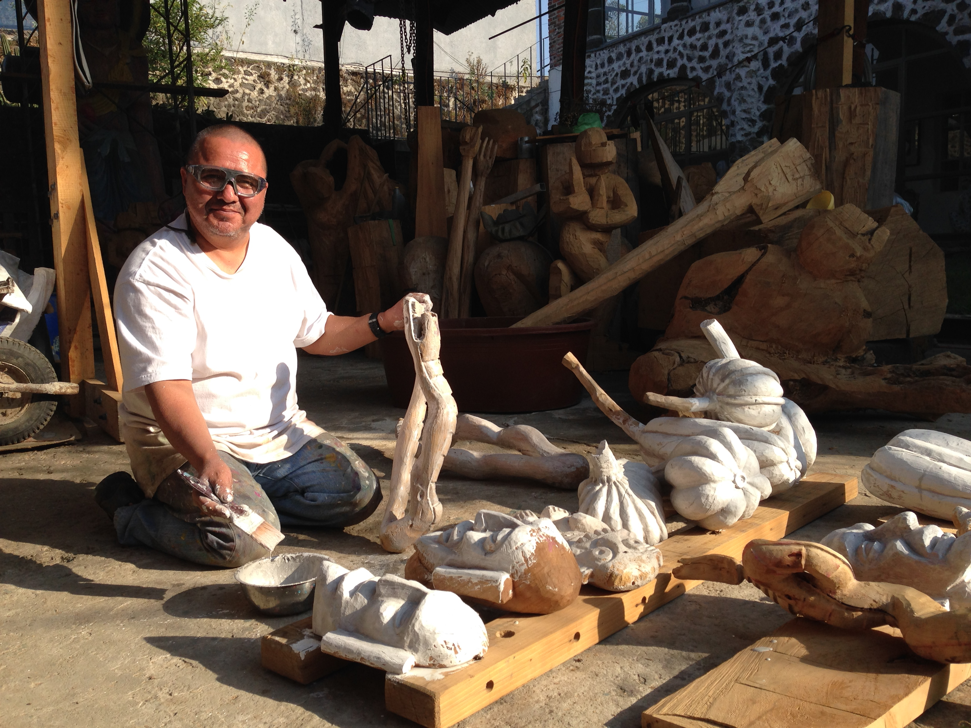 Germán Venegas trabajando con la técnica de estuco.